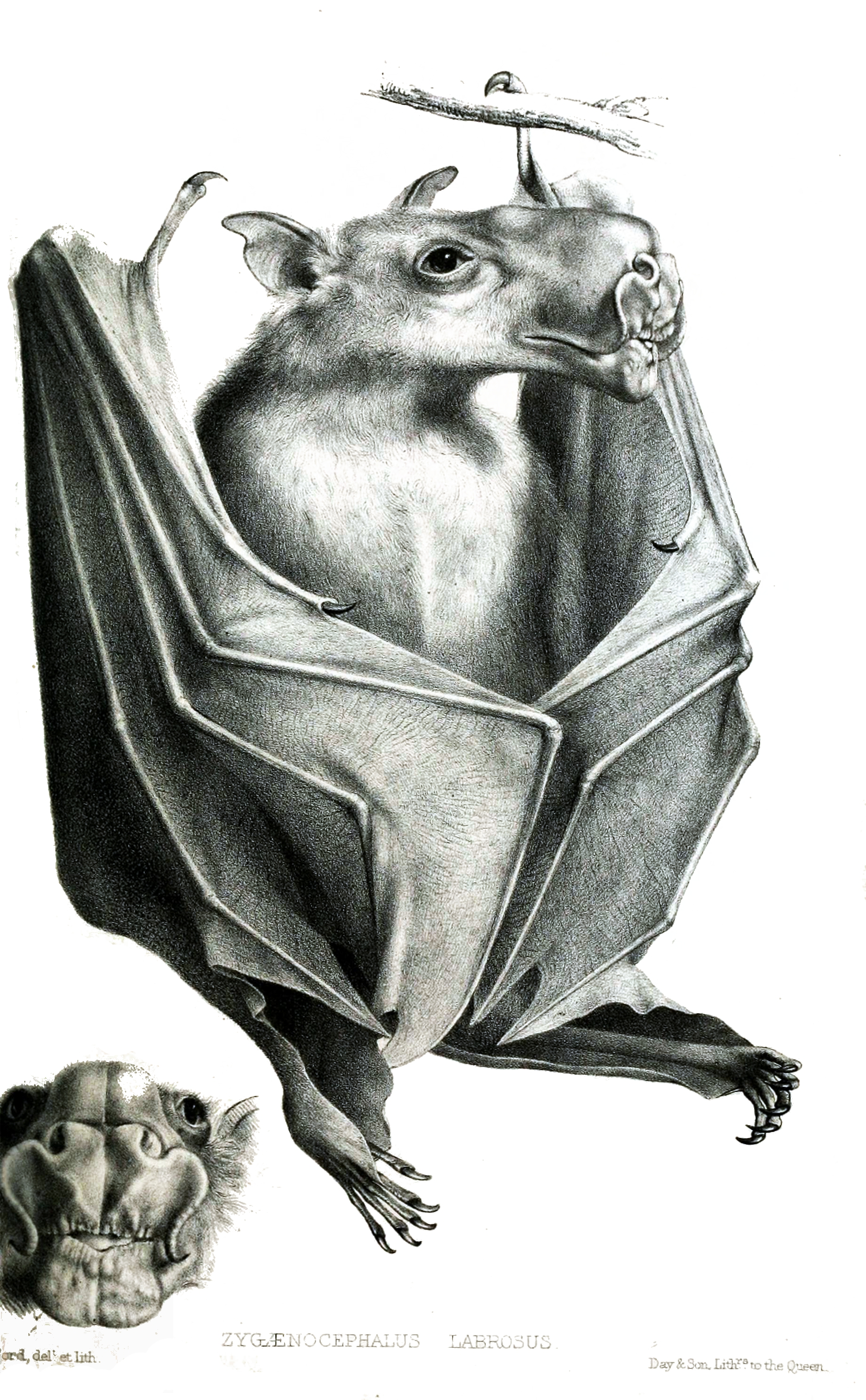 Zygaenocephalus labrosus = Hypsignathus monstrosus